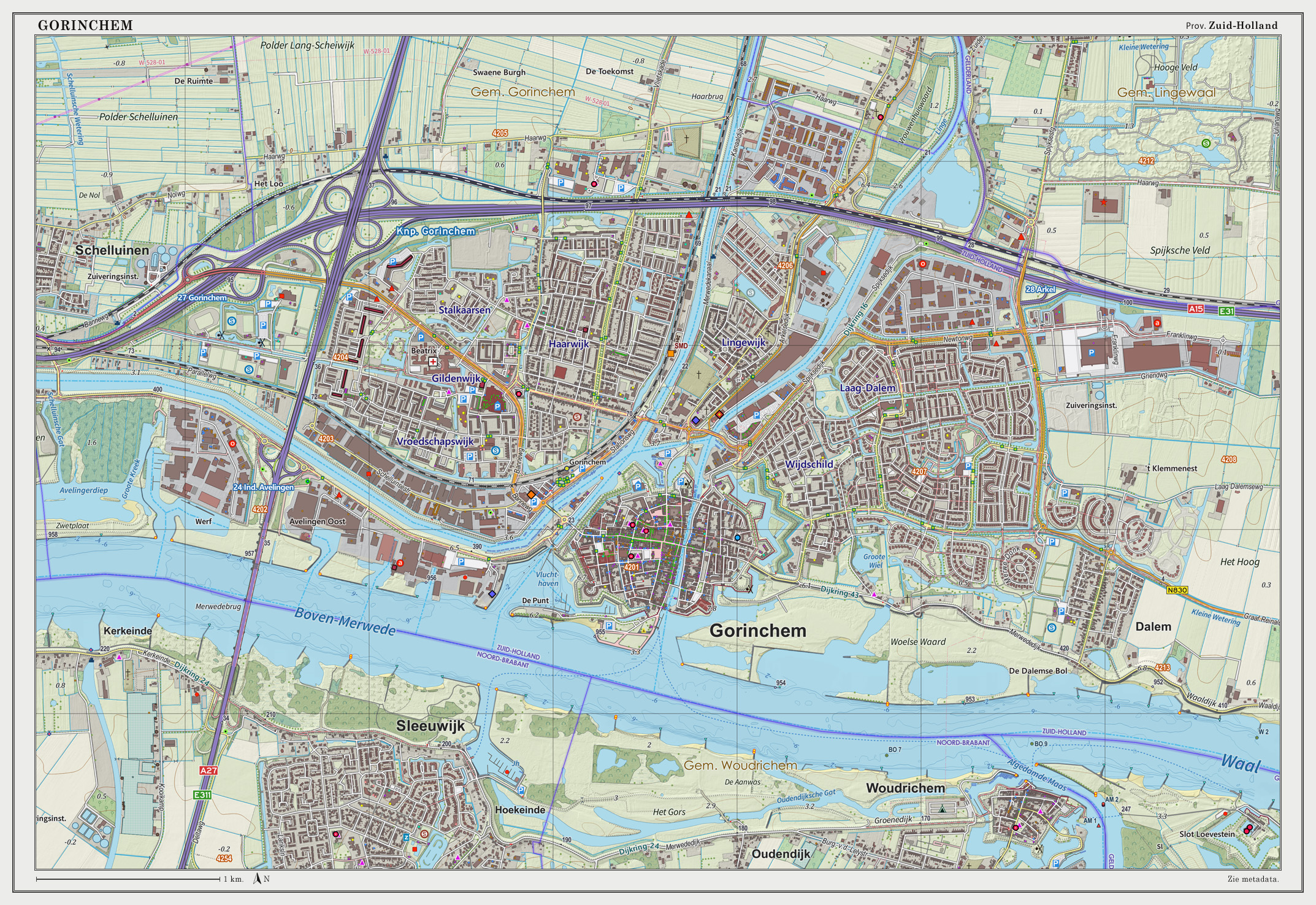 Topografische kaart van Gorinchem (woonplaats). Resolutie: 300 pixels/km. Kaartbeeld samengesteld uit de open geodata van de Top10NL en Top25namen (Basisregistratie Topografie, Kadaster), Creative Commons BY licentie. Gebouwvlakken uit open geodata BAG extract. Wegen uit de OpenStreetMap, OpenStreetMap community. Reliëfschaduw uit de Actuele Hoogtekaart AHN2. Samenstelling en kleurenschema: Jan-Willem van Aalst, met QGIS2. Zie ook de Legenda.